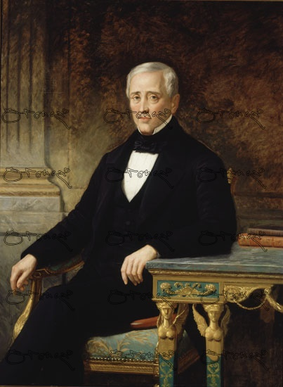 Pedro Antonio Acuña y Cuadros,presidente del Congreso de los Diputados en 1841. Óleo sobre lienzo, 131 x 97 cm, Madrid, Congreso de los Diputados, Galería de Retratos